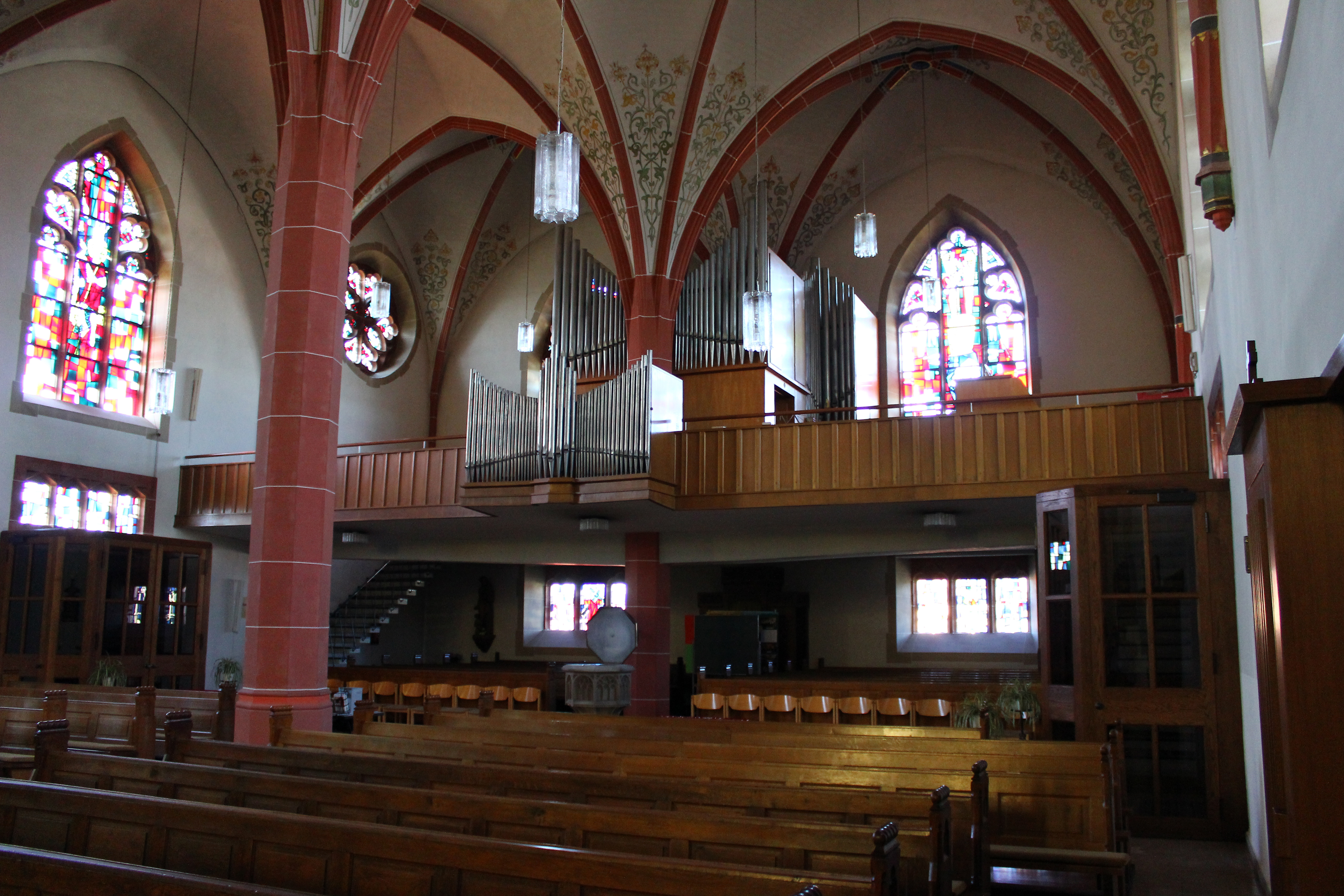 Blick ins Innere der katholischen Pfarrkirche Herz Jesu in Gresaubach, einem Stadtteil von Lebach, Landkreis Saarlouis, Saarland